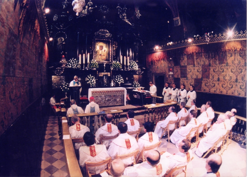 Congresso Czestochowa